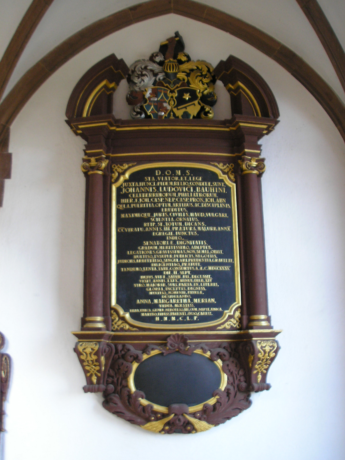 Part of Basel Münster (Kreuzgang). Epitaph for Johann Ludwig Bauhin (1666–1735)